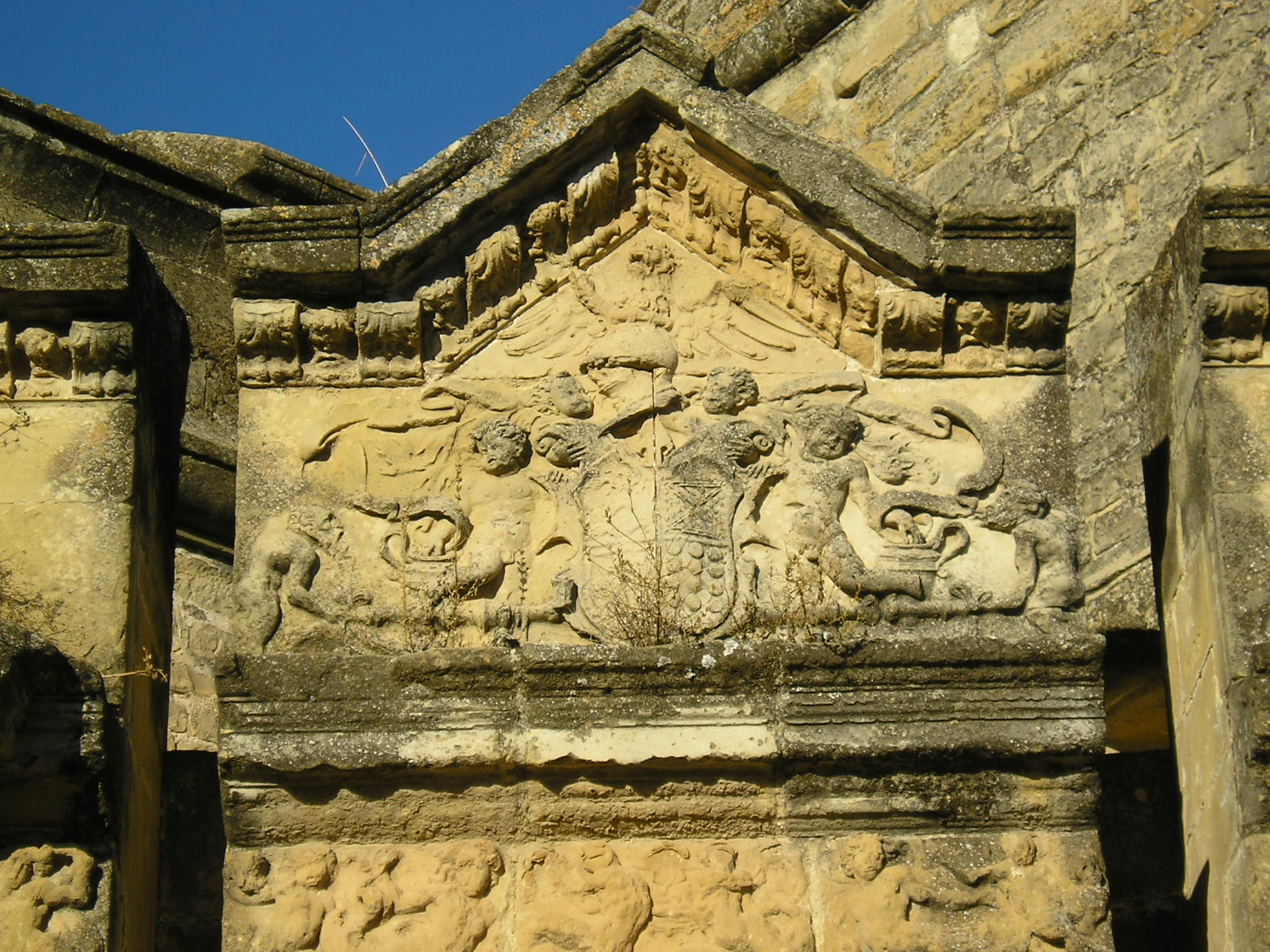 Detalle de Escudo en Castillo de Sabiote